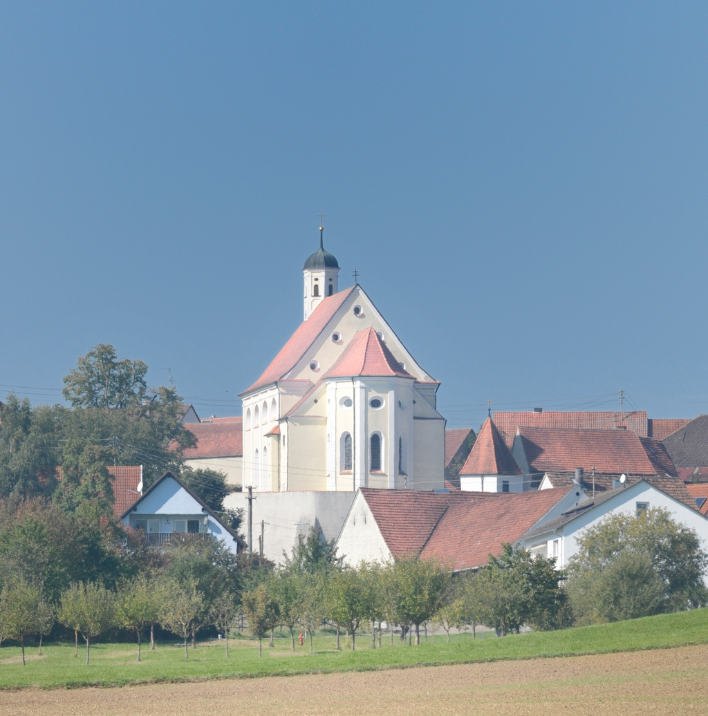 Stillnau